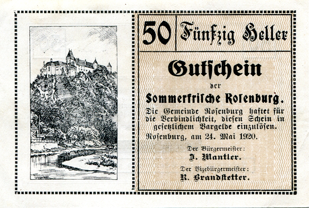 Notgeld der Gemeinde Rosenburg, Niederösterreich, Österreich, 1920